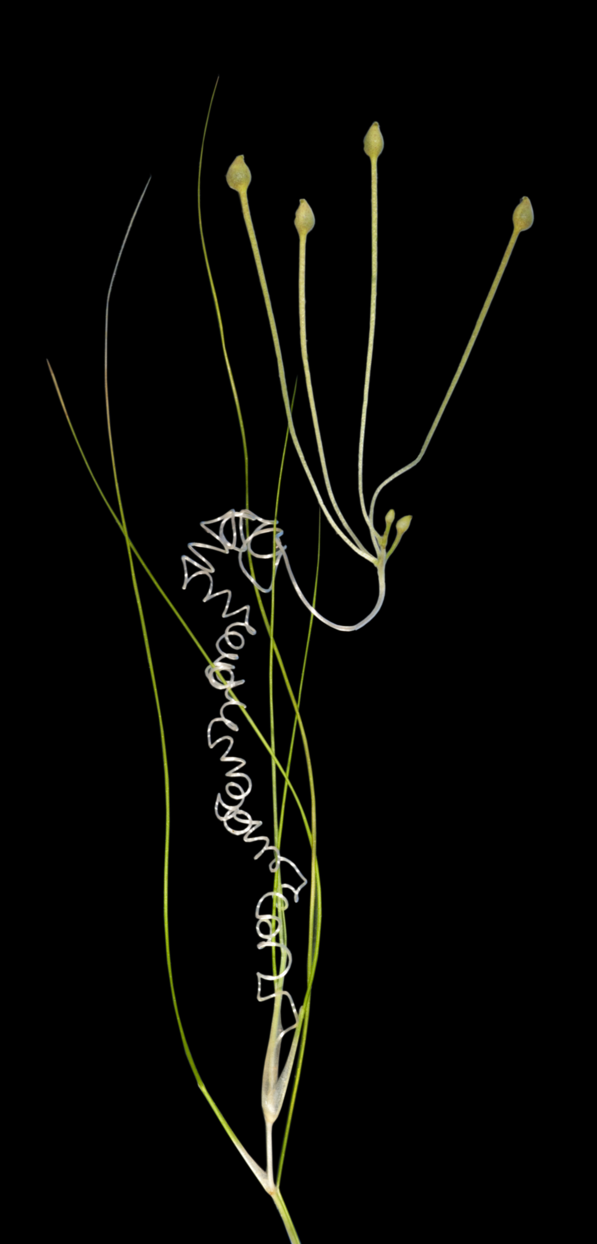 KRT4615